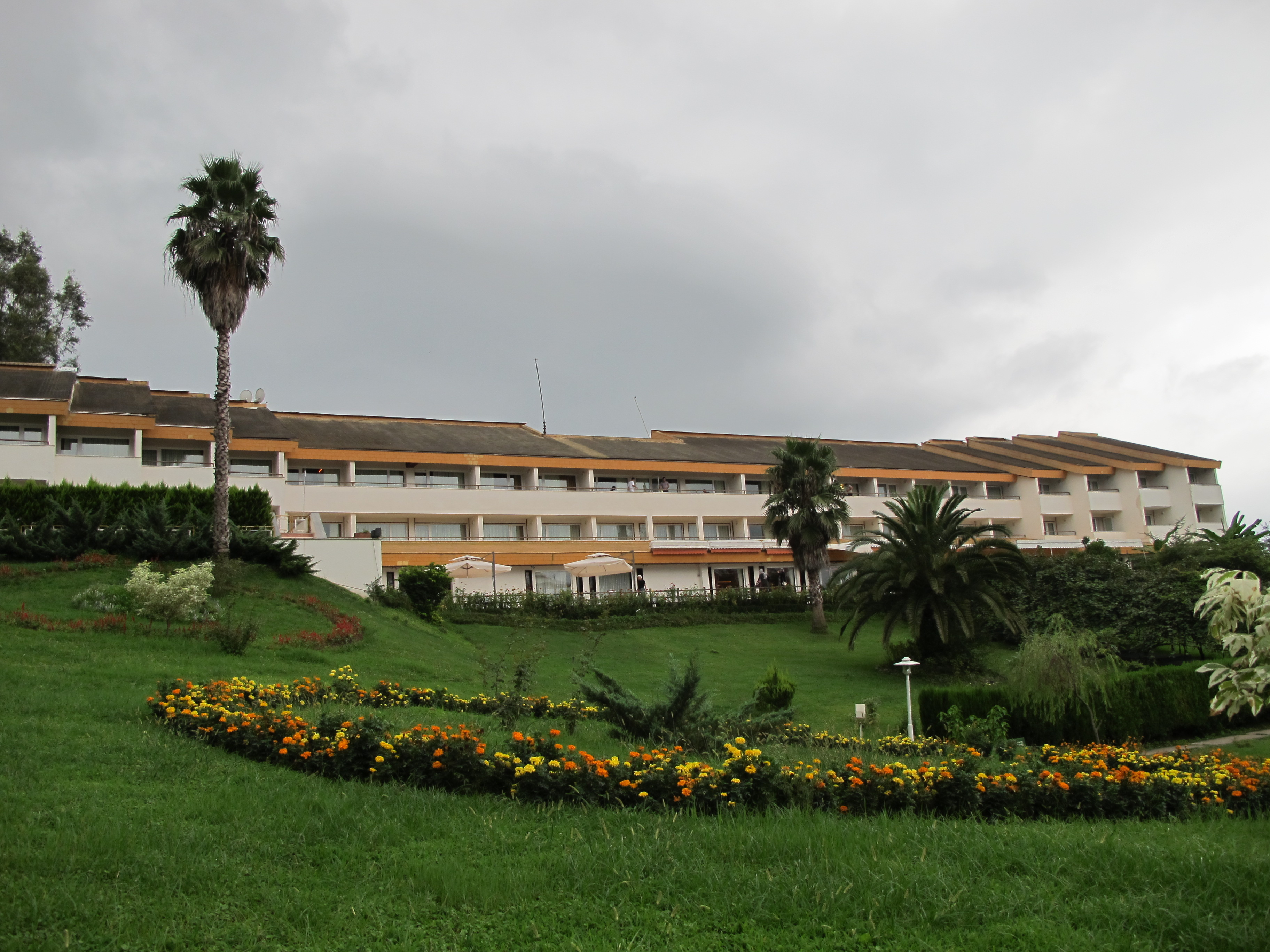 hotel Salar Dareh